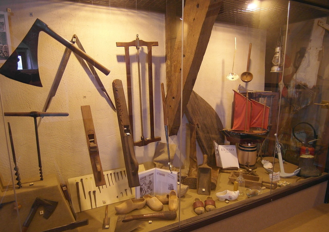 Vitrine de l'une des collections du musée